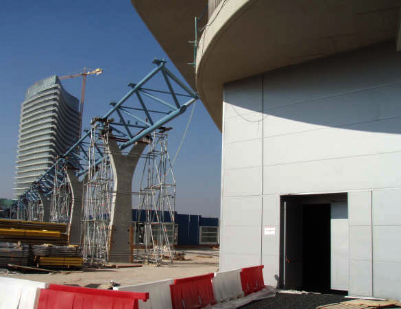 Avances en la construcción del Pabellón de México en la Expo 2008 Zaragoza.